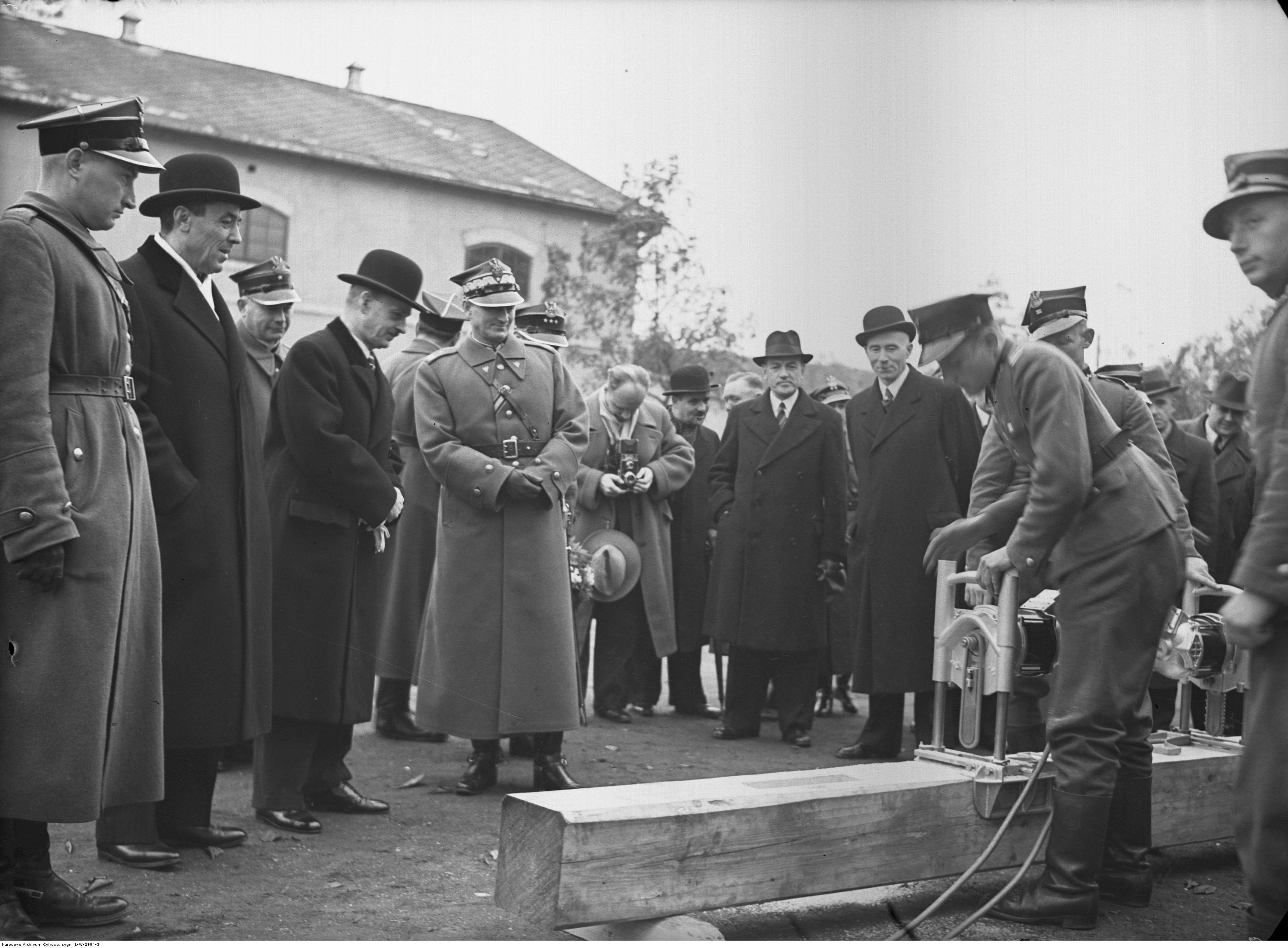 Przekazanie sprzętu wojskowego 1 Batalionowi Mostów Kolejowych w Krakowie, ufundowanego przez pracowników warsztatów kolejowych w Płaszowie. Dowódca OK V gen. bryg. Aleksander Jerzy Narbutt-Łuczyński (w środku), wojewoda krakowski Józef Tymiński i wiceprezydent Krakowa Stanisław Klimecki oglądają pracę saperów przy zastosowaniu nowego sprzętu. Koncern Ilustrowany Kurier Codzienny - Archiwum Ilustracji. Sygnatura: 1-W-2994-3